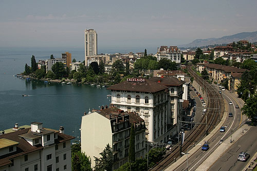 Montreux von Osten her gesehen